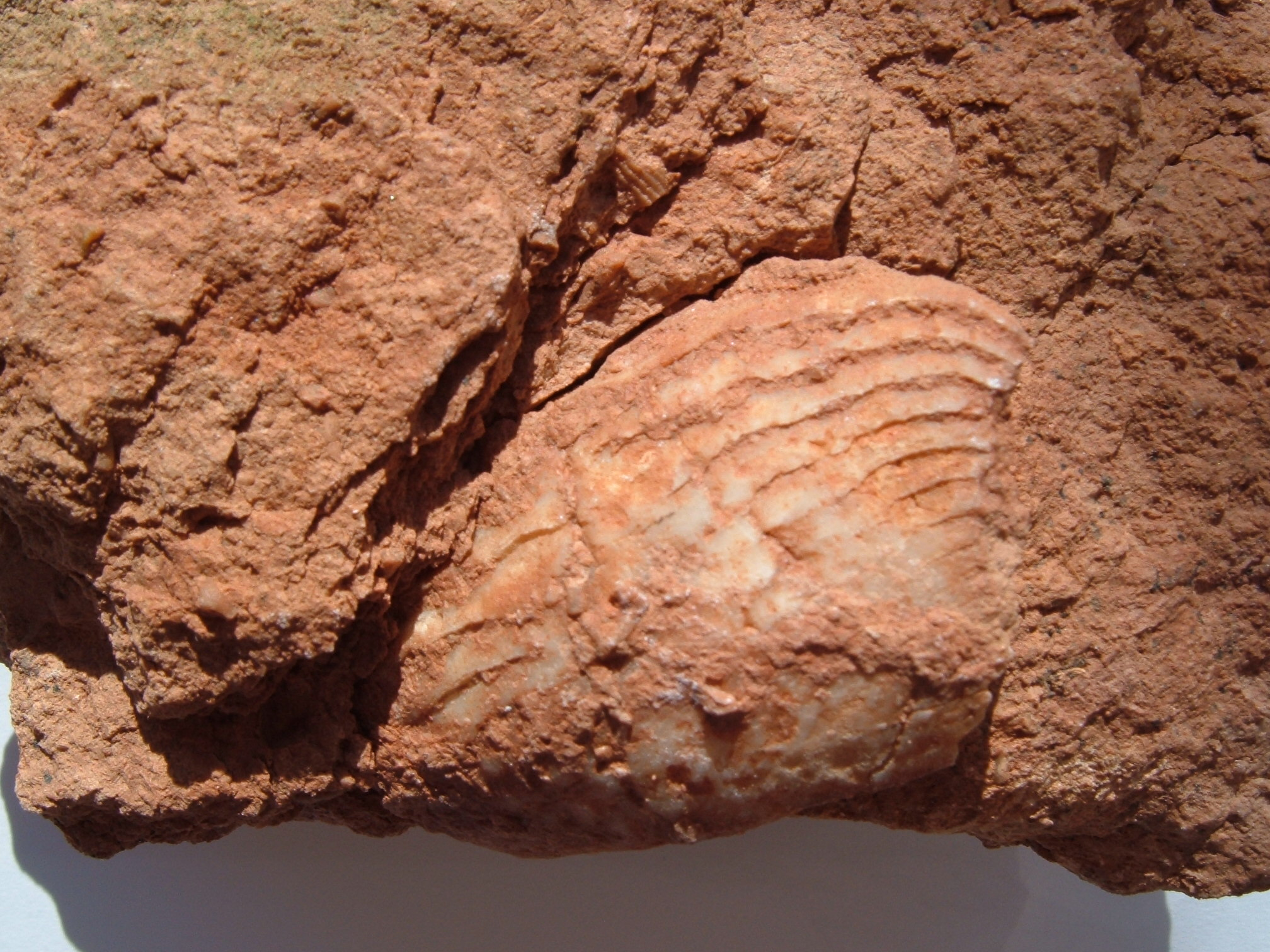 Aptychus